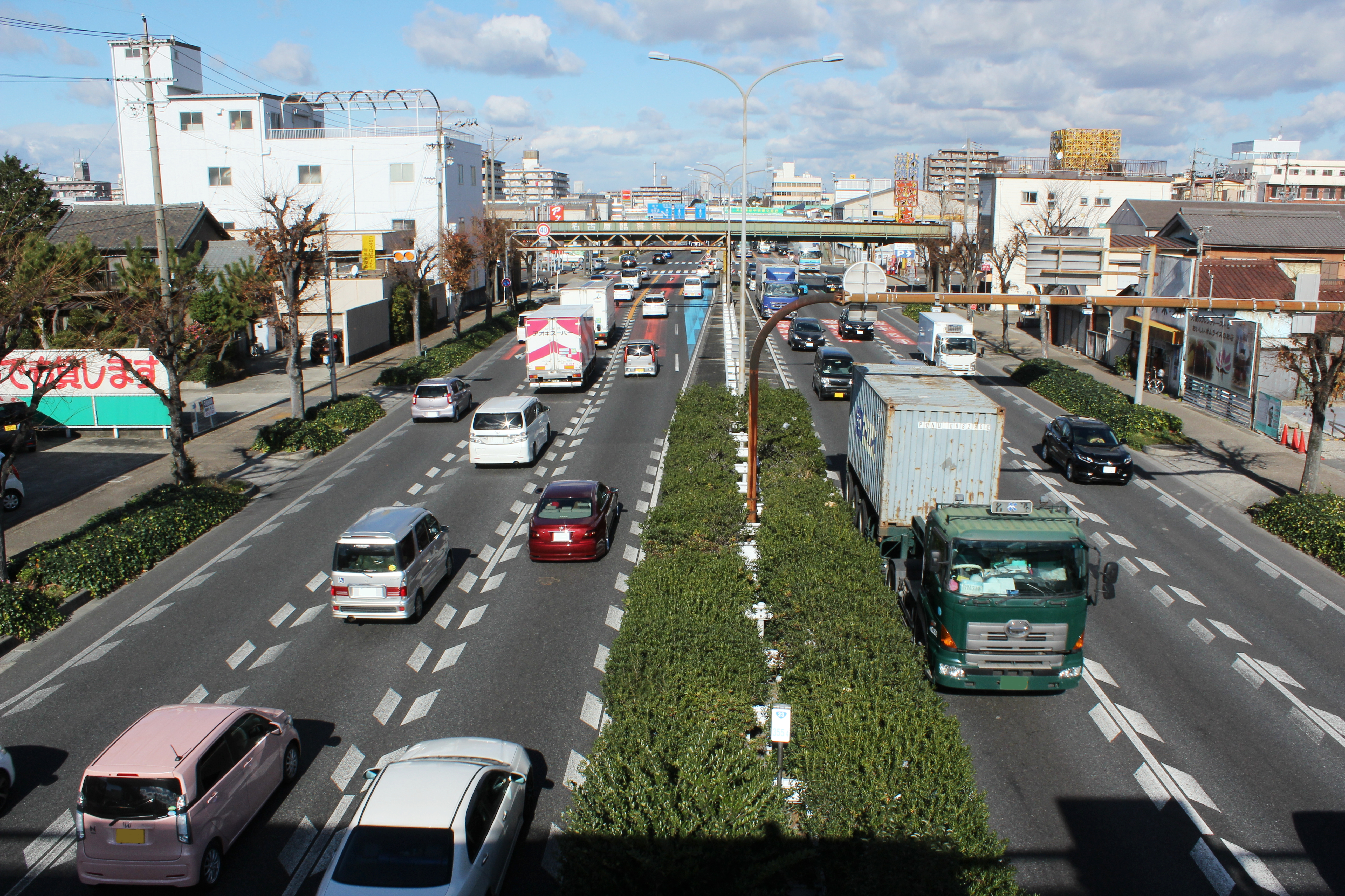 国道23号名四国道（名古屋市南区）